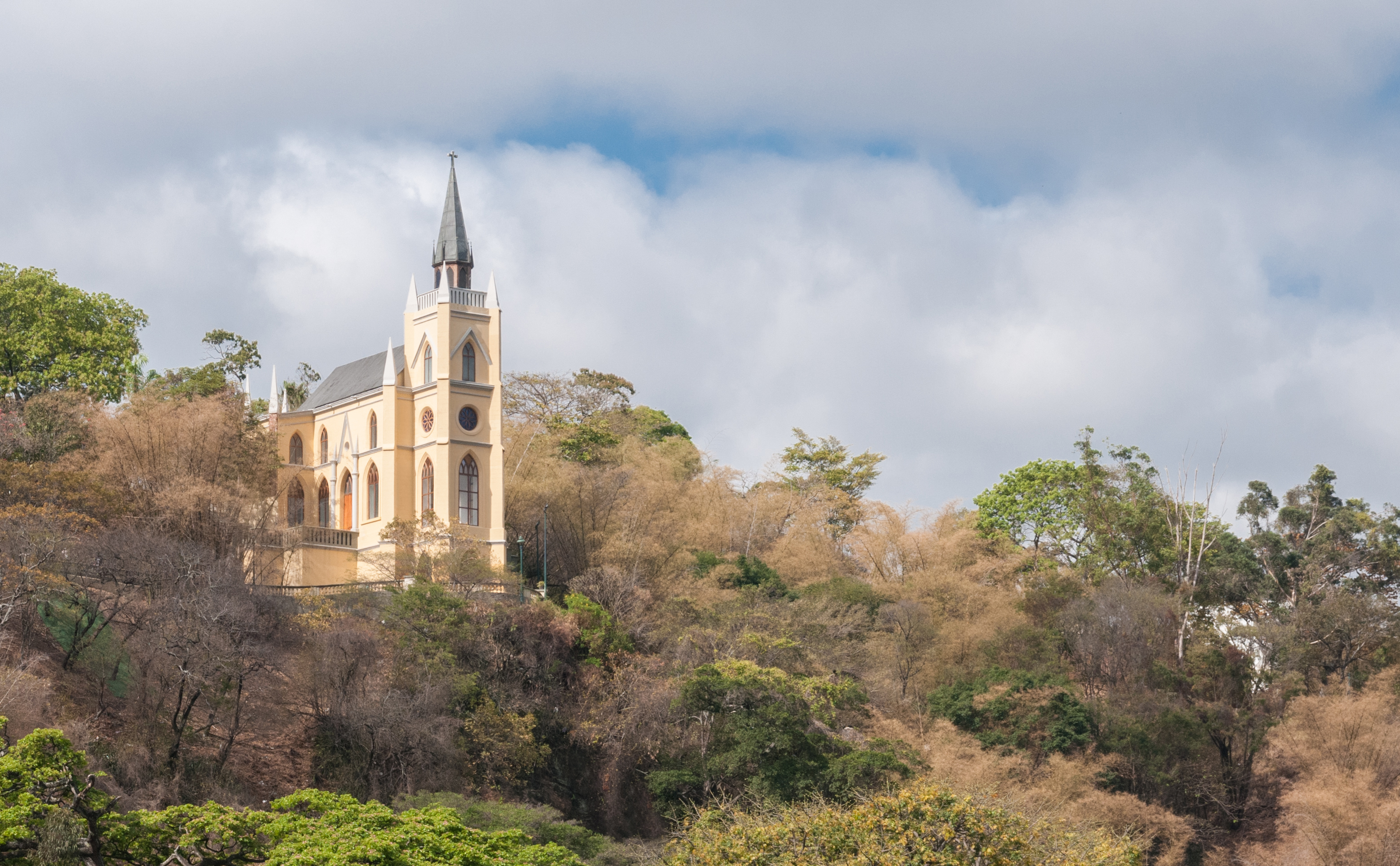 En 1884 asume el gobierno Joaquín Crespo, quien se empeña en hacer ciertas ampliaciones al paseo, además del cambio de nombre a Paseo Independencia. Así en 1885 se incluyó otro templo, la capilla Nuestra Señora de Lourdes,[1] de estilo arquitectónico gótico